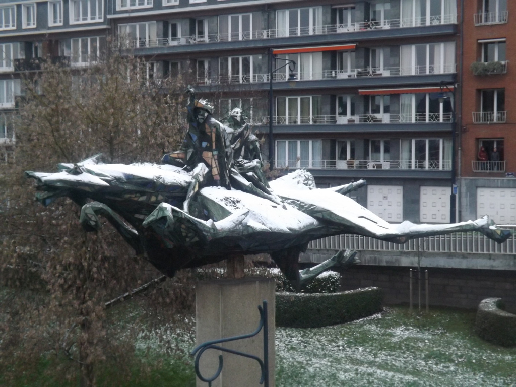 Au Pont des Ardennes a Namur. Les Quatre Fils Aymon1953, sculpture en bronze, incrustée de céramiques, oeuvre de Olivier Strebelle, sculpteur et céramiste belge , né à Bruxelles en 1927. Cette oeuvre a participé à l'Expo 58 de Bruxelles.